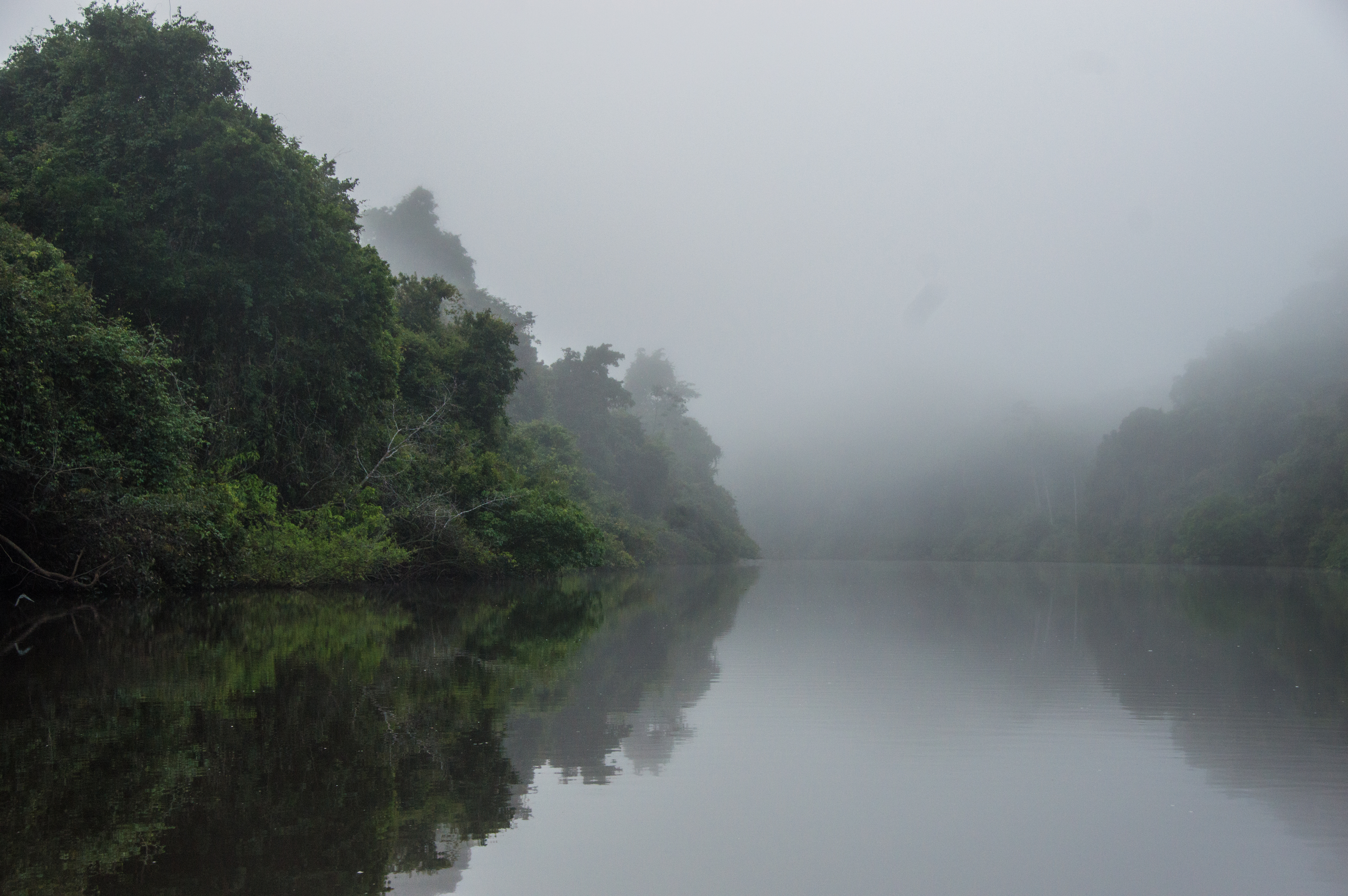 Manhã nublada no Rio Novo, Estação Ecológica Terra do Meio, Pará, Brasil.